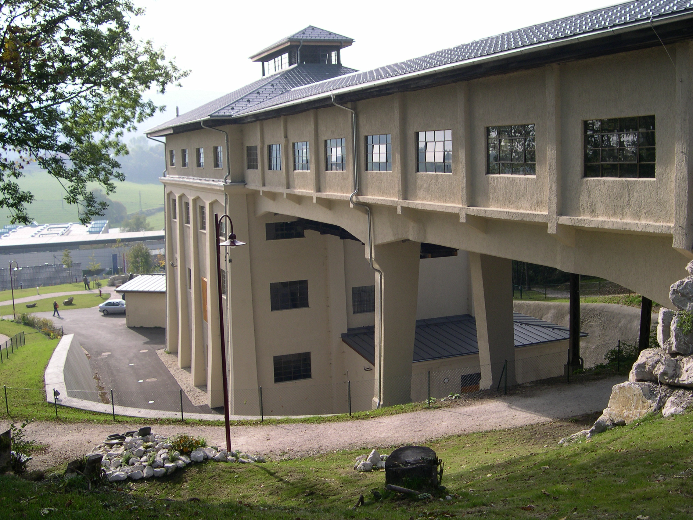 Kohlebrecher Buchleiten in Ampflwang, Hausruckwald